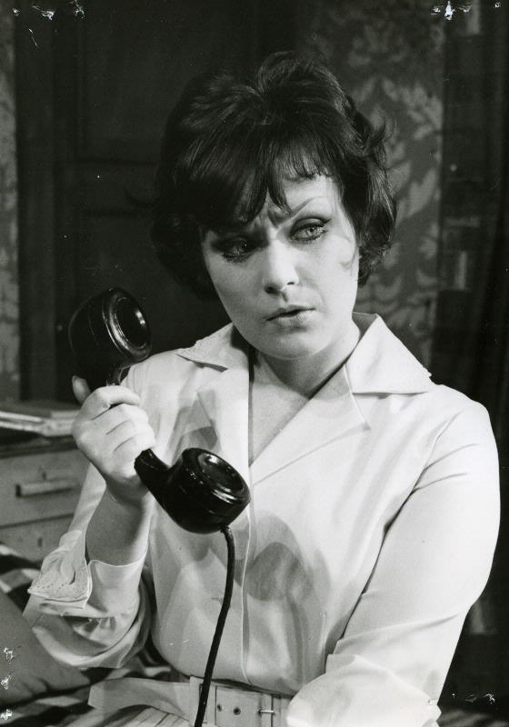 Gerd Hegnell i Två på gungbrädet på Helsingborgs stadsteater.